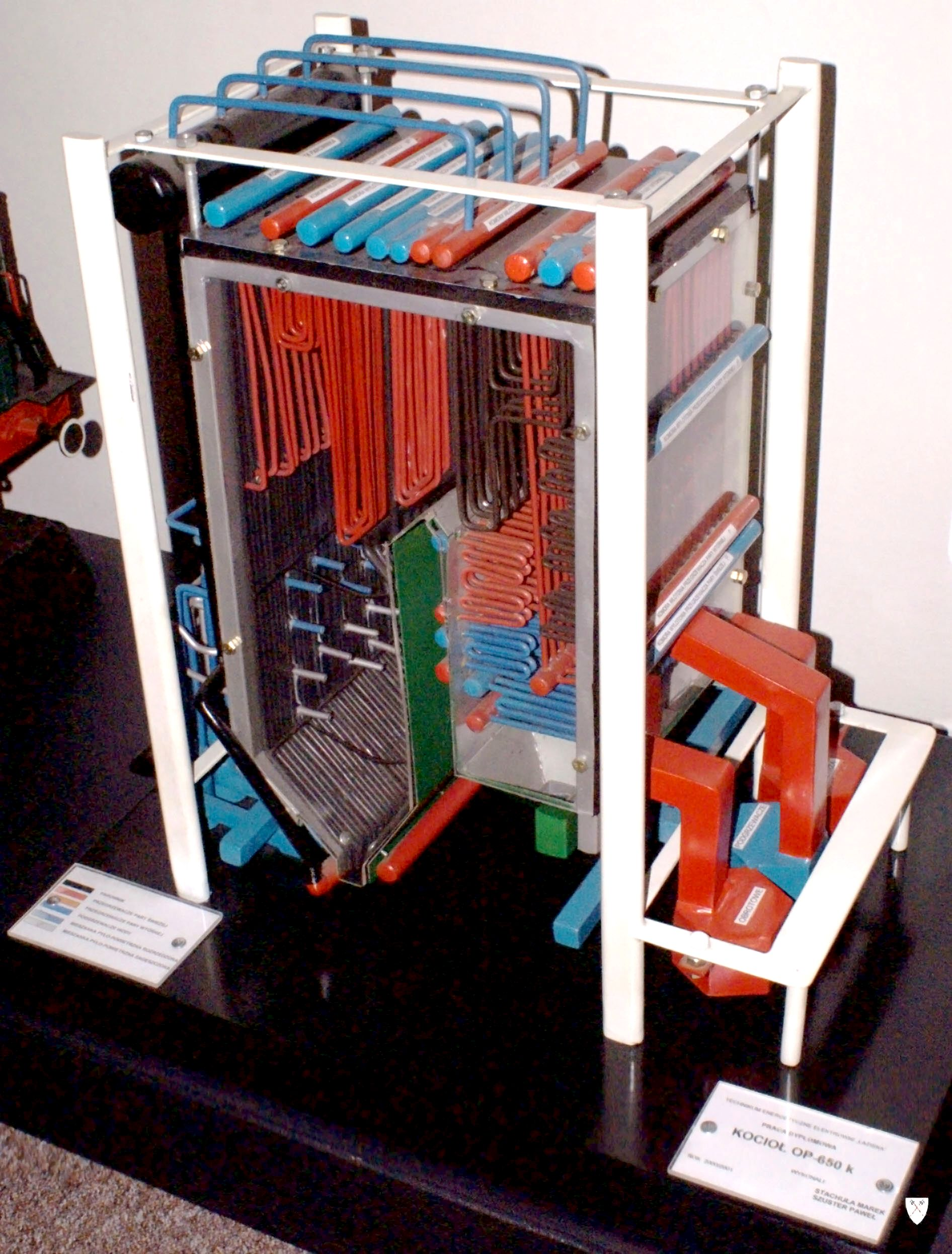 Model kotła OP-650k produkcji Rafako wykonany przez Marka Stachułe i Pawła Szustra.